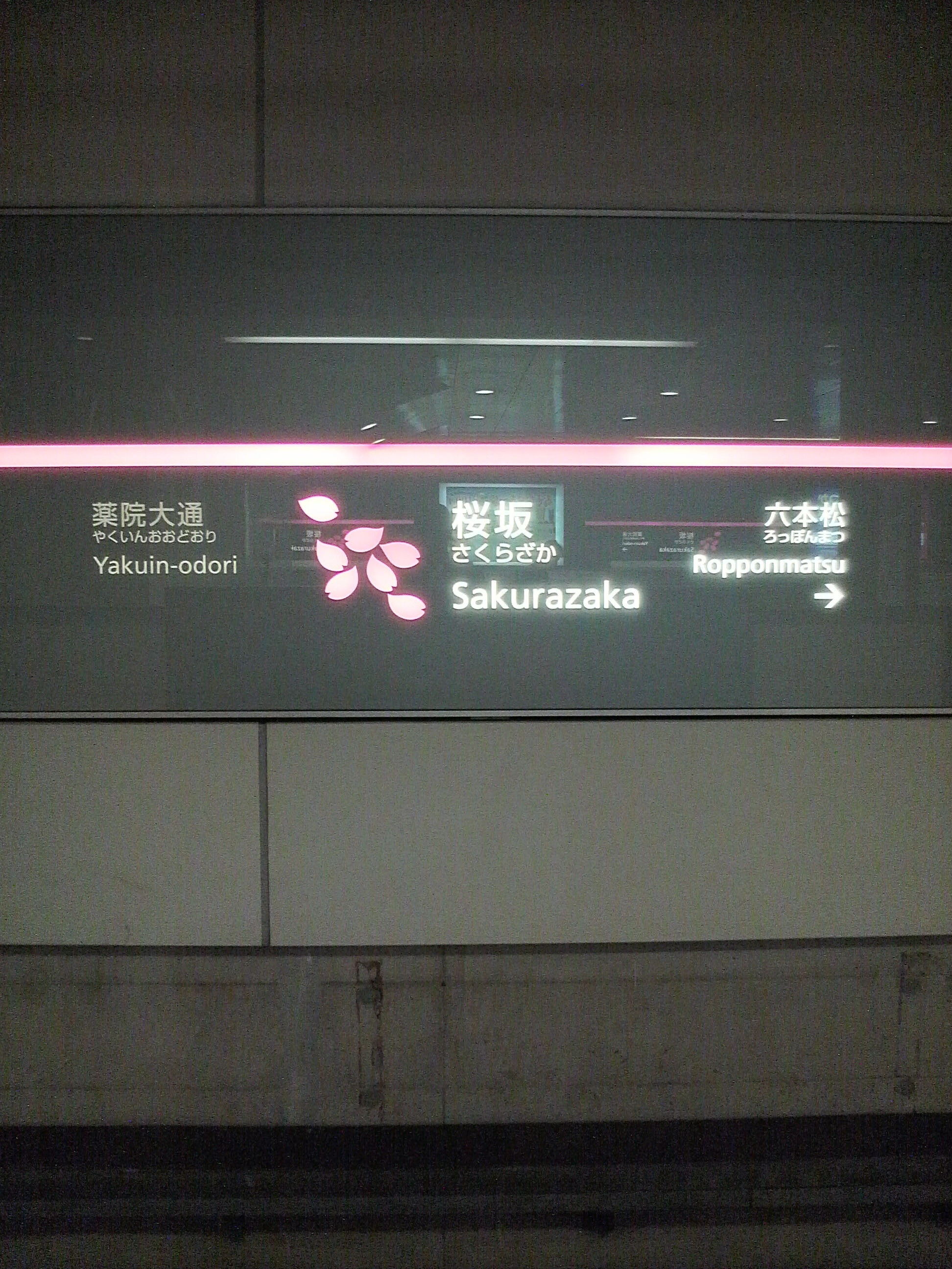 福岡市地下鉄七隈線桜坂駅の駅名標